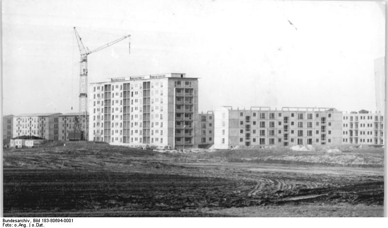 Hoyerswerda, Wohnungsbau, Hochhäuser